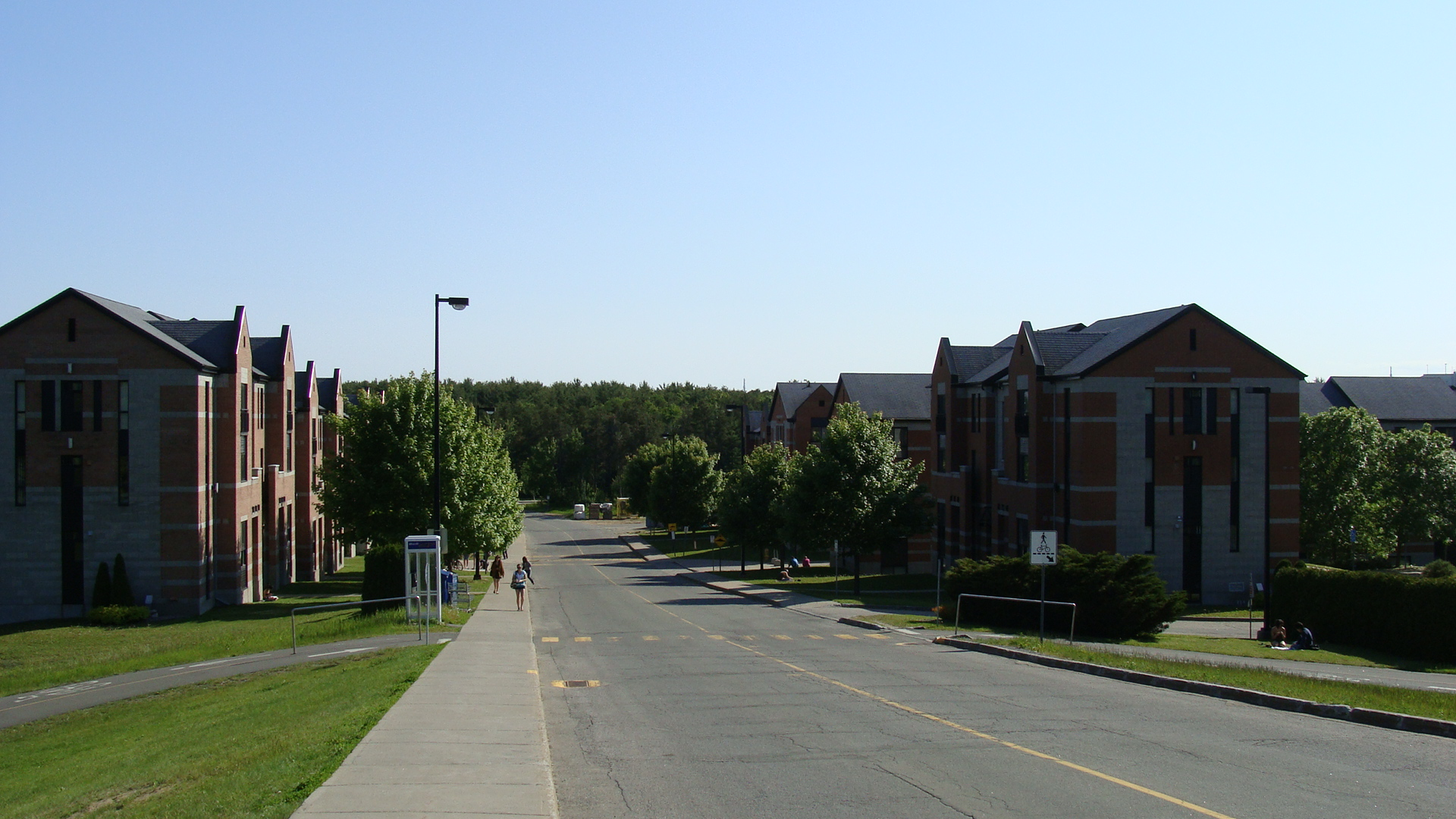 Les résidences du chemin Michel Sarrazin de l'Université du Québec à Trois-Rivières, au Québec (Canada).